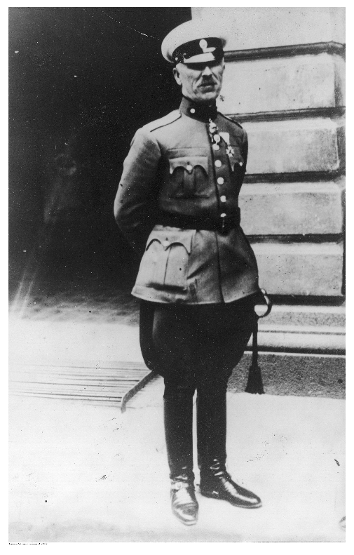 Снимка на ген. Пенчо Златев, български военен и политик, министър-председател на Царство България (1935).